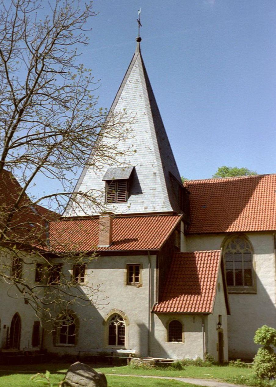 Kirche des ehemaligen Klosters Malgarten (Stadt Bramsche)